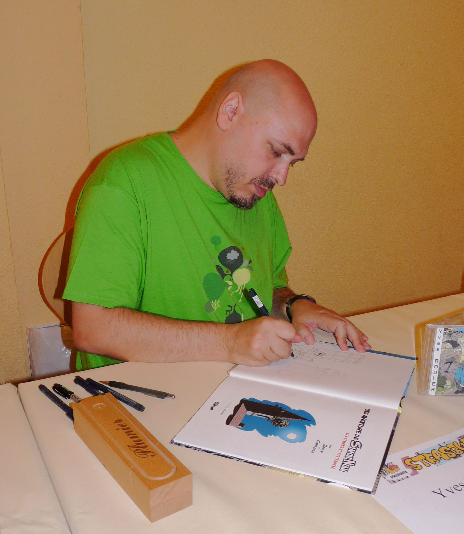 Yves Rodier au Festival européen de la bande dessinée Strasbulles 2009. Yves Rodier est un dessinateur québécois célèbre pour ses pastiches de Tintin.